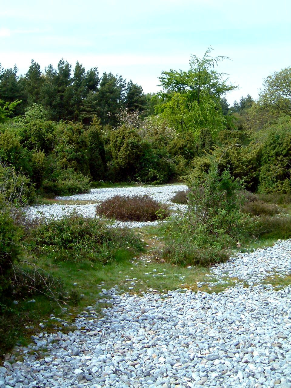 Naturschutzgebiet N 43A „Steinfelder in der Schmalen Heide“ bei Mukran auf Rügen: Feuersteinfelder